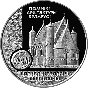 Беларуская (тарашкевіца): Манэта "Царква–фартэцыя Сынковічы"